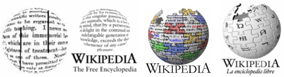 Sucesive Wikipedia logos